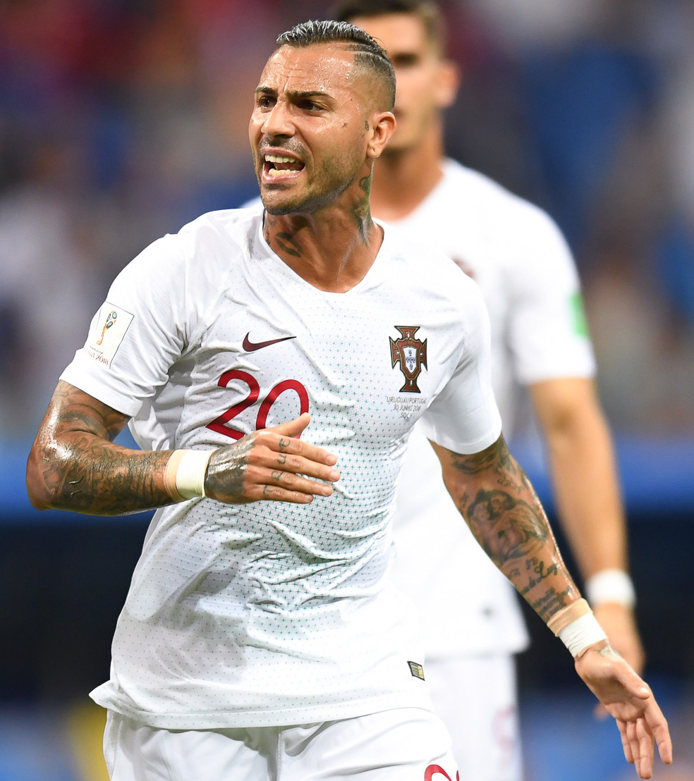 День, когда Роналду попрощался с ЧМ. Кавани и Суарес идут дальше